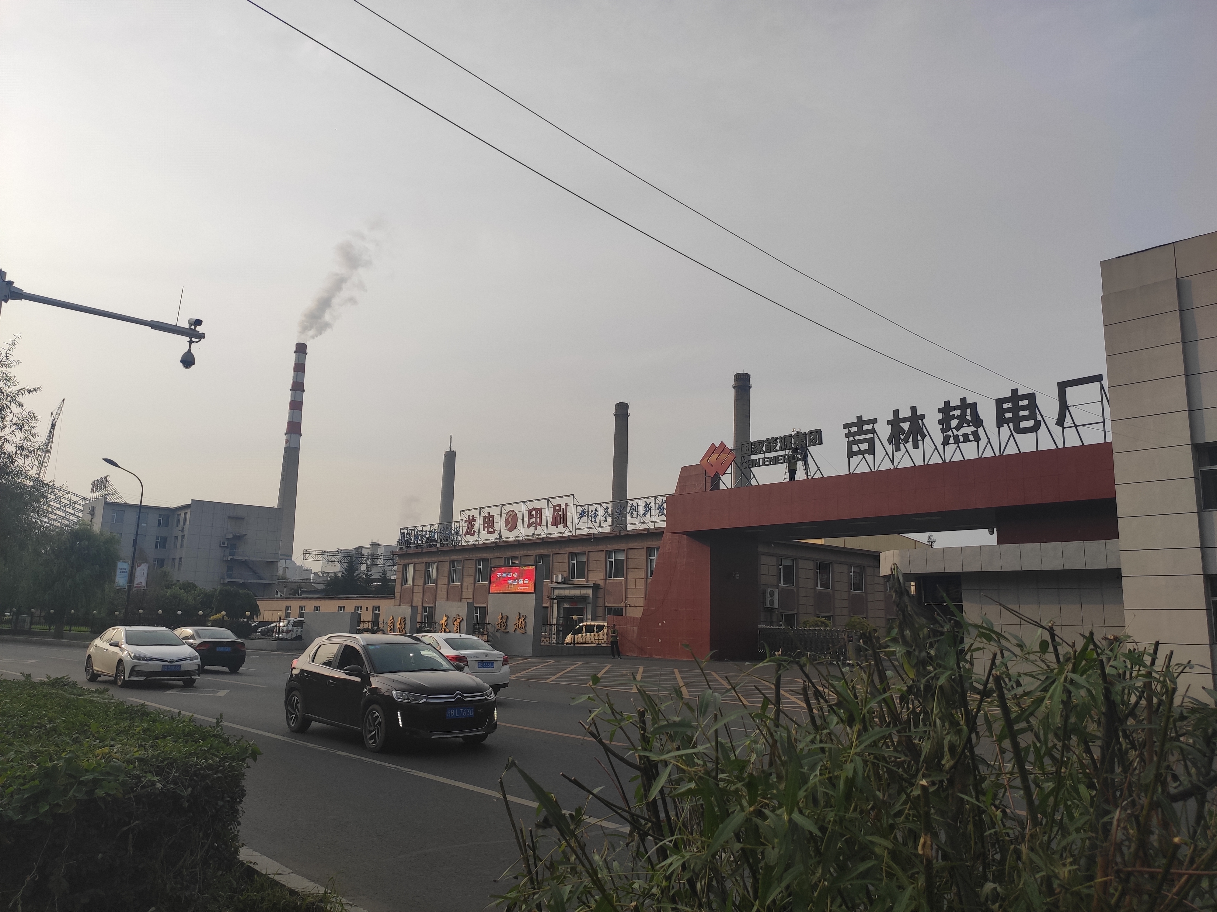 国家能源投资集团吉林热电厂